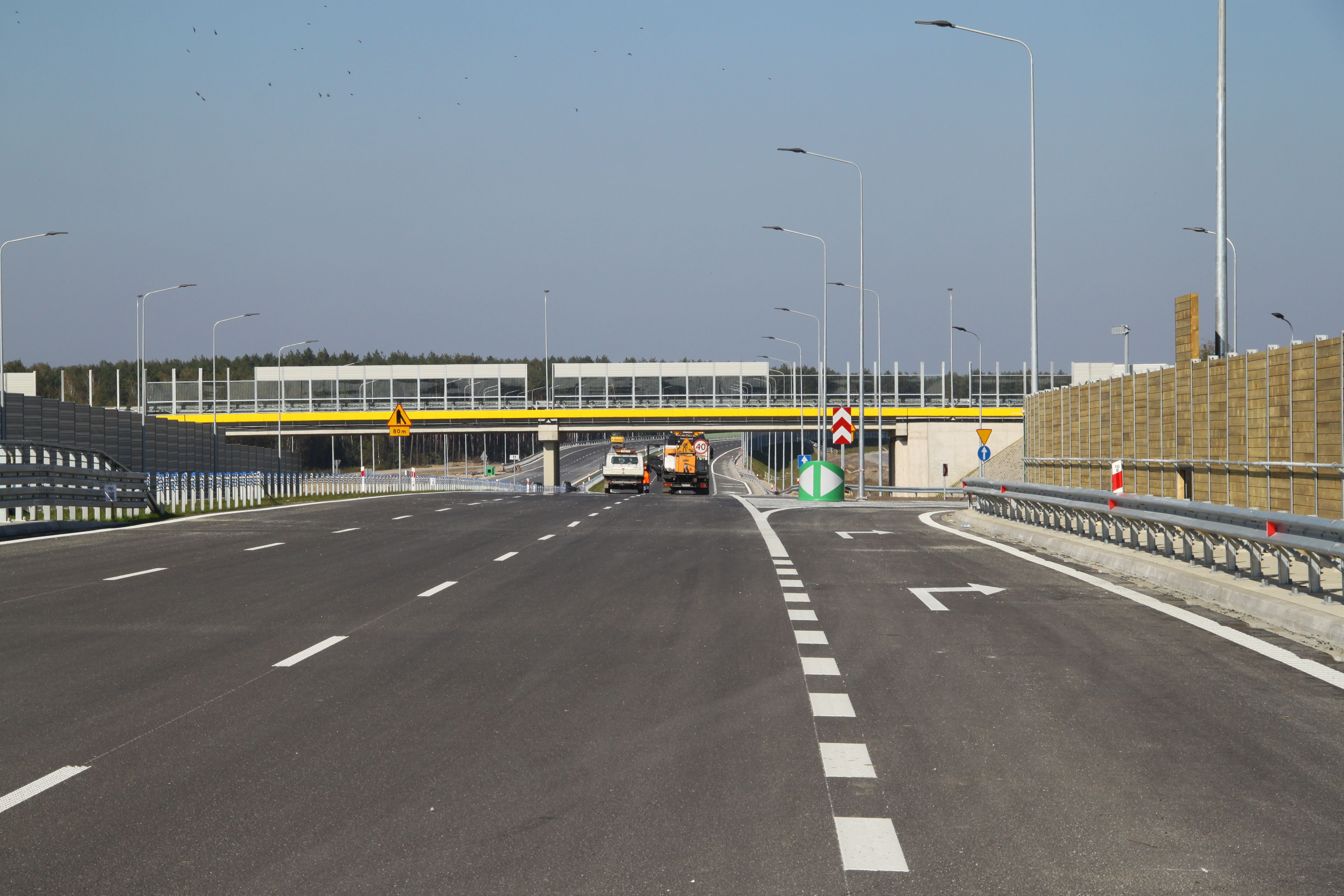 Trasa S8 Marki-Radzymin (Obwodnica Marek) z mostu nad rzeką Długą (położony administracyjnie w Wołominie) przed wiaduktem przyszłego, nowego przebiegu drogi wojewódzkiej nr 635 poprowadzonego nad nią na węźle Wołomin na granicy Nadmy i Nowego Jankowa.